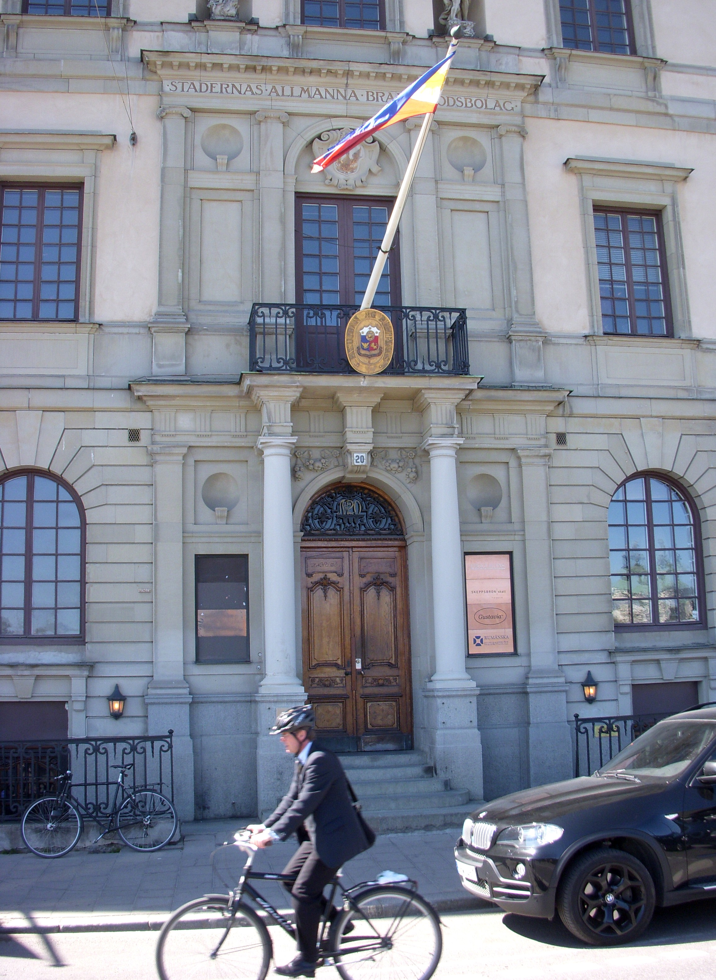 Filipinska ambassaden Skeppsbron 20 i Stockholm